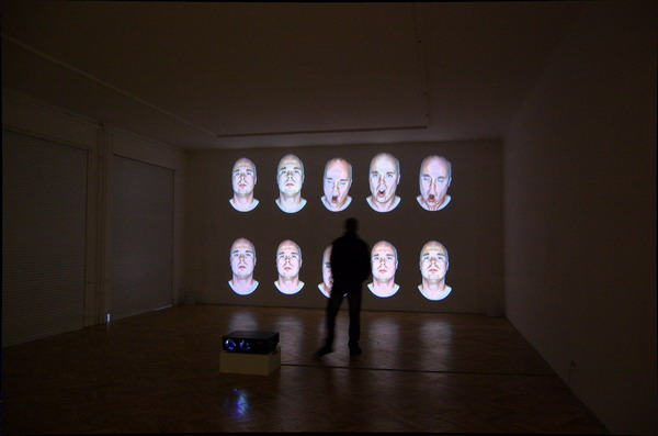 THIS IS MY VOICE - Installationview - Roland Wegerer